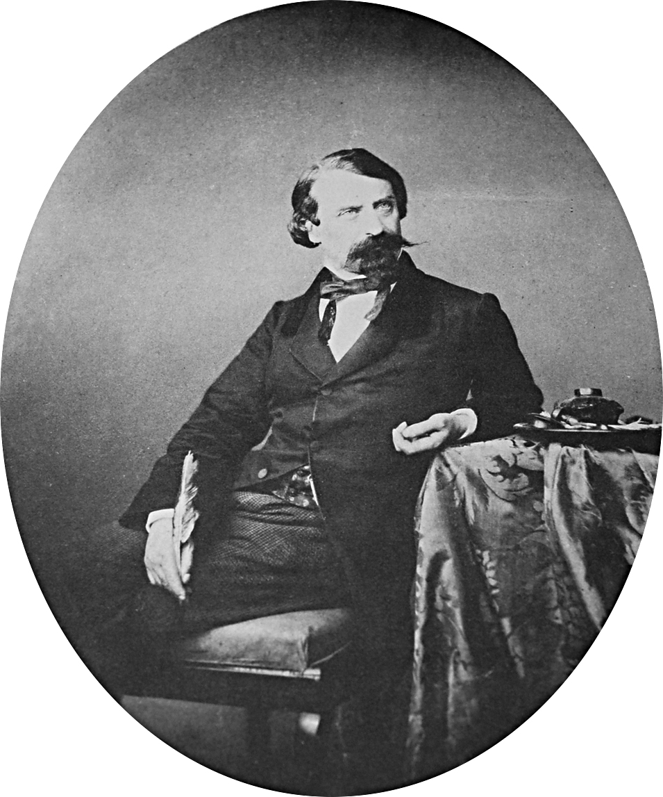 Il poeta Aleardo Aleardi (1812-1878)